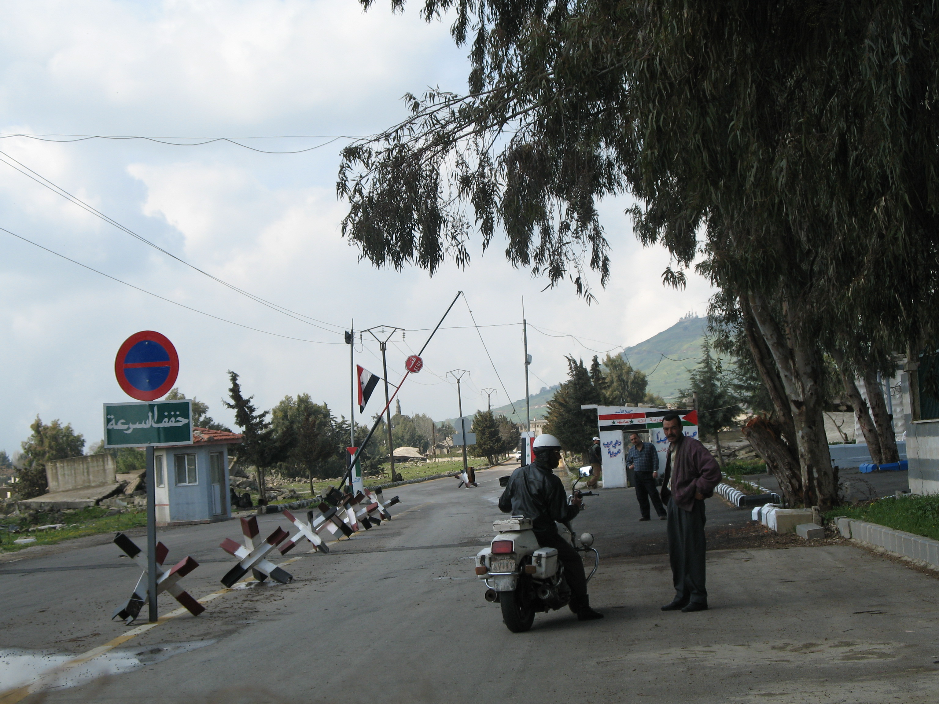 frontière syrienne sur le plateau du golan donnant accès à l'enclave Palestinienne